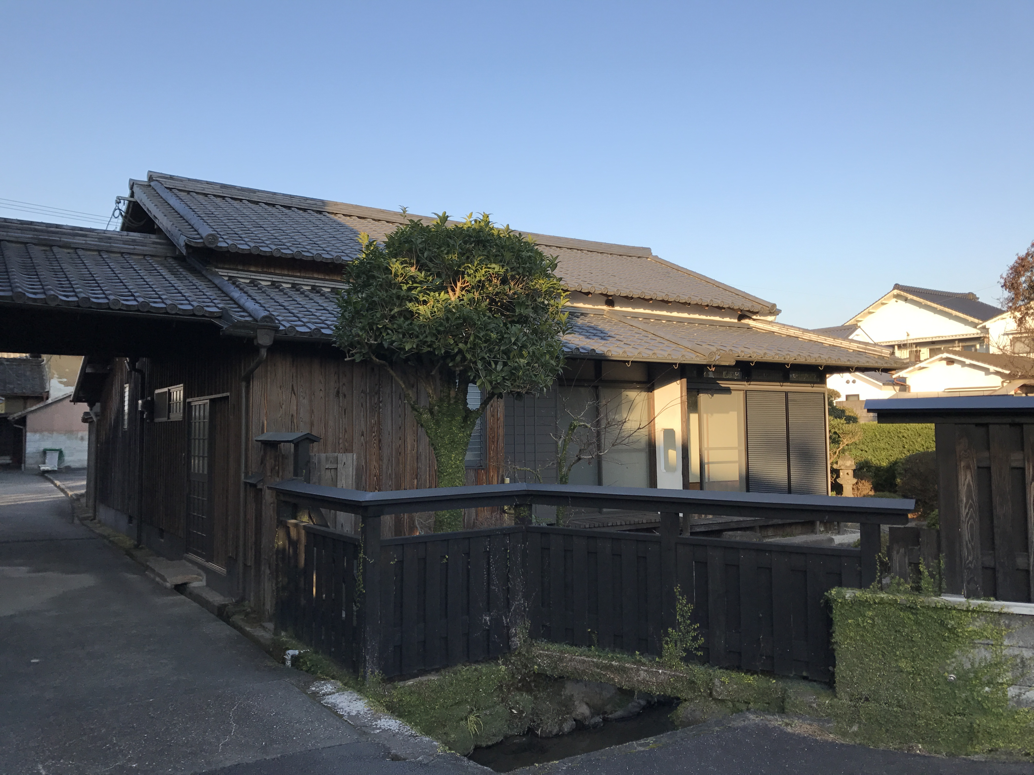 豆田町・南西側より望む廣瀬淡窓旧宅南家